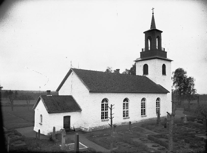 Skölvene kyrka